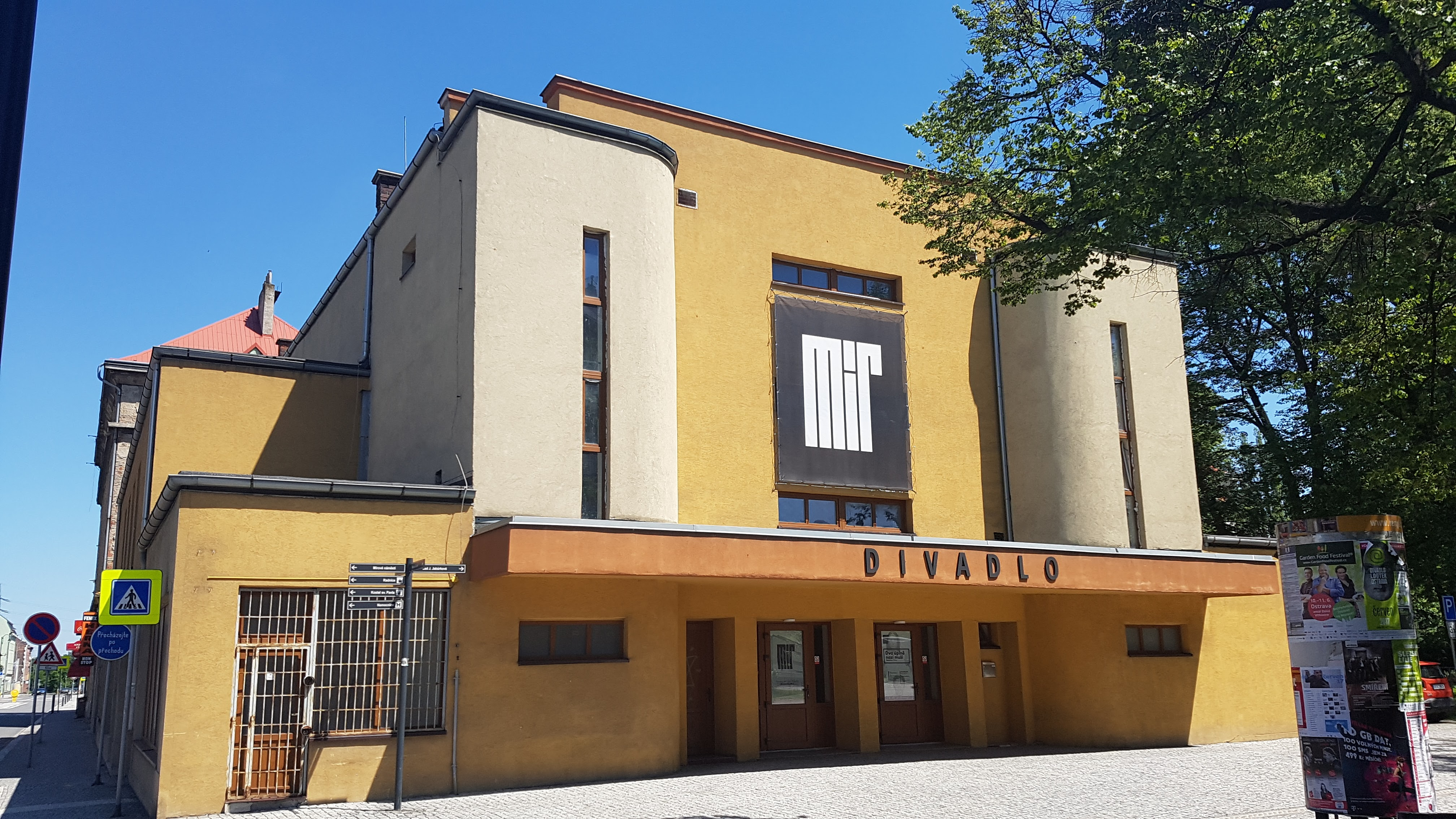 Divadlo Mír v Ostravě Vítkovicích. Čelní strana